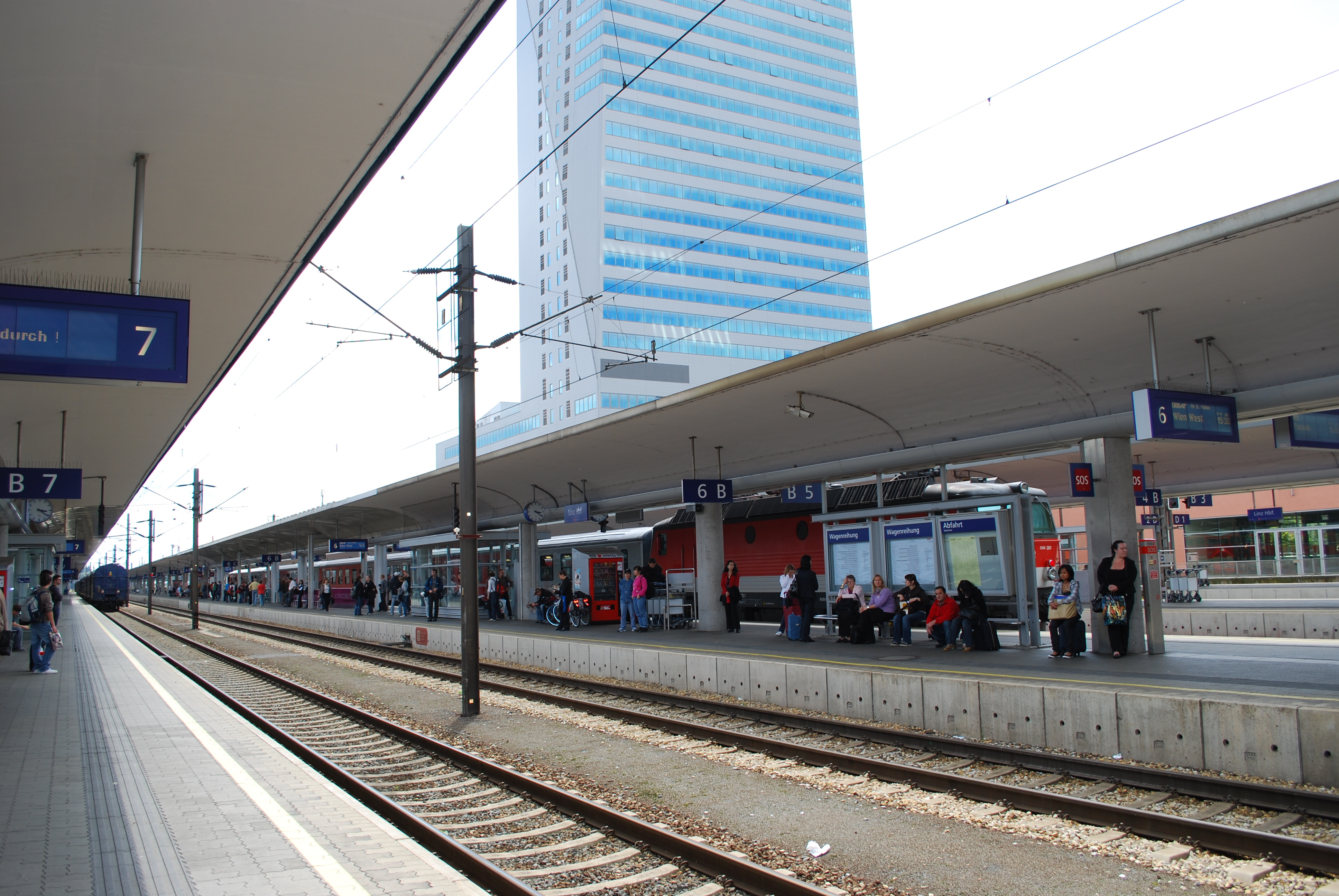 Bahnsteige des Bahnhofs Linz Hbf